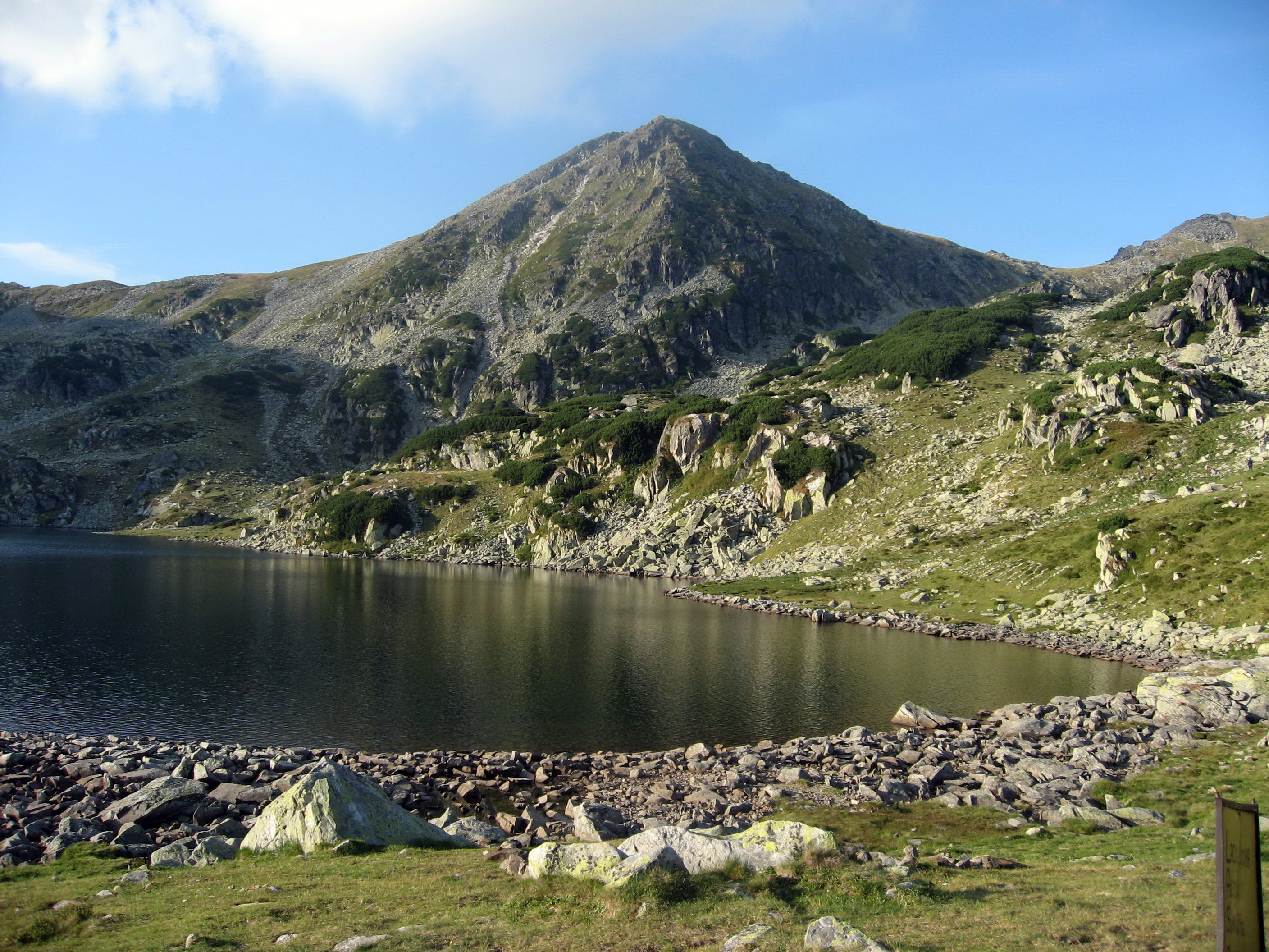 Jezero Bucura